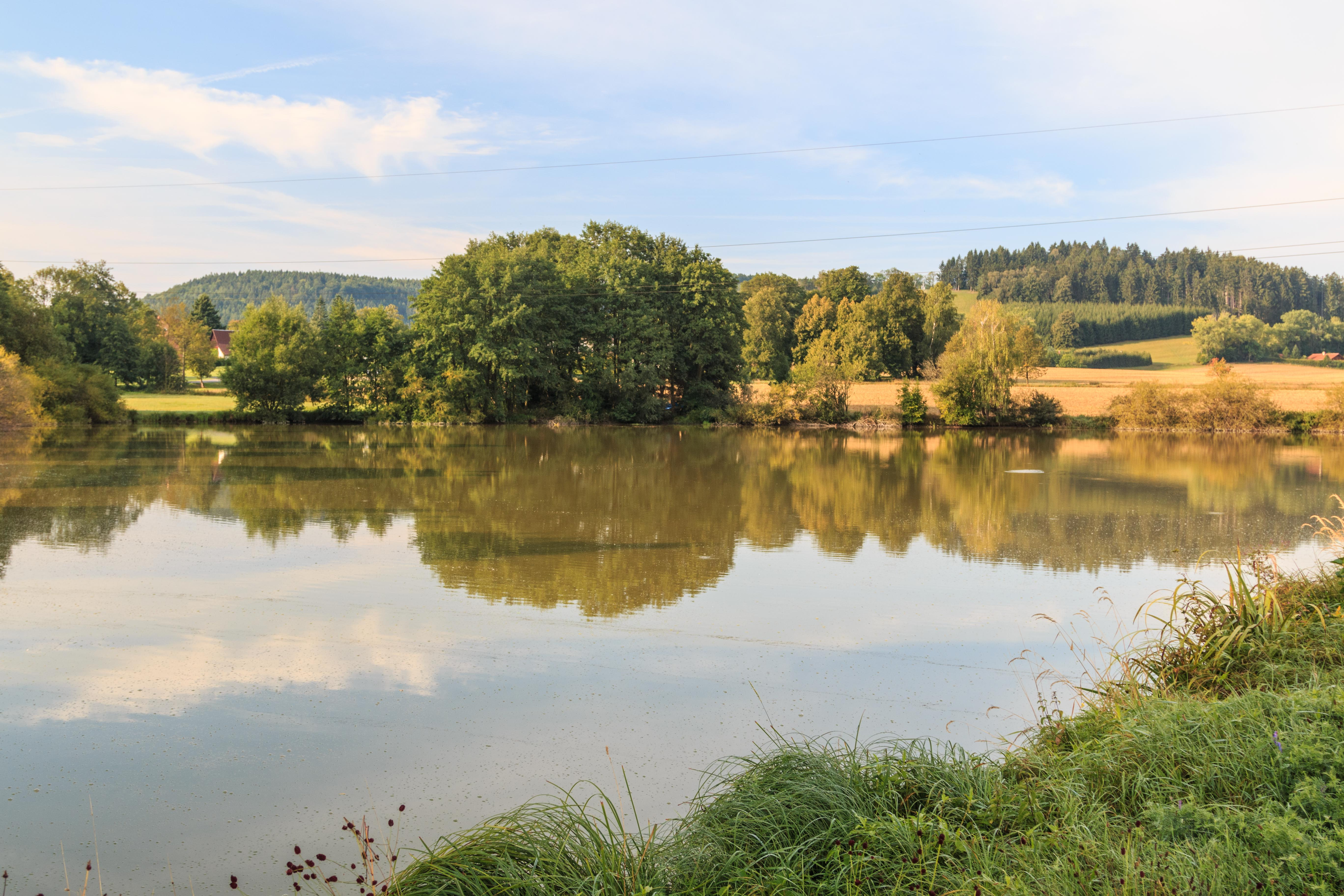 Prostřední rybník u Přívratu